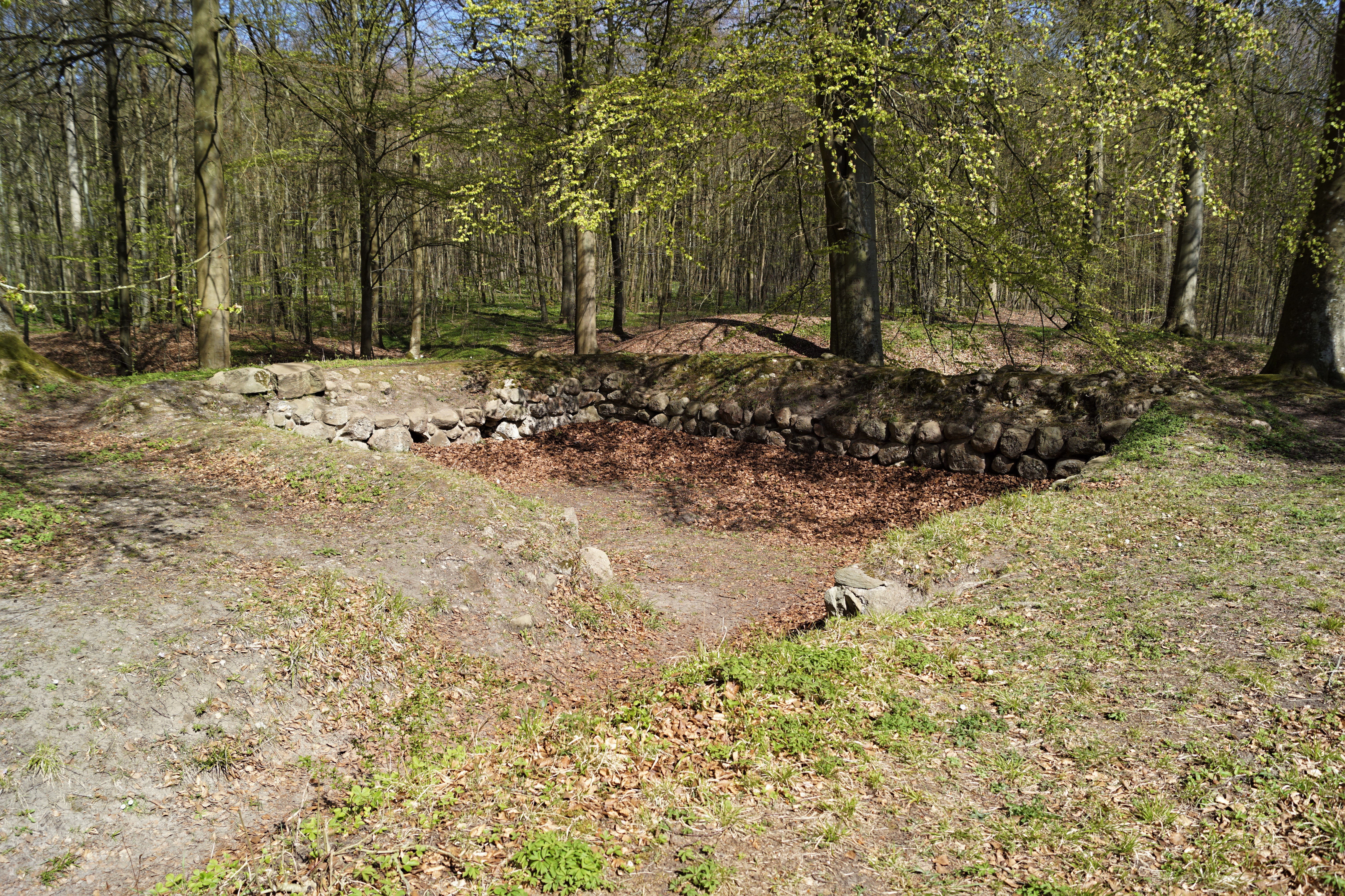 Fundamentrester af borgen